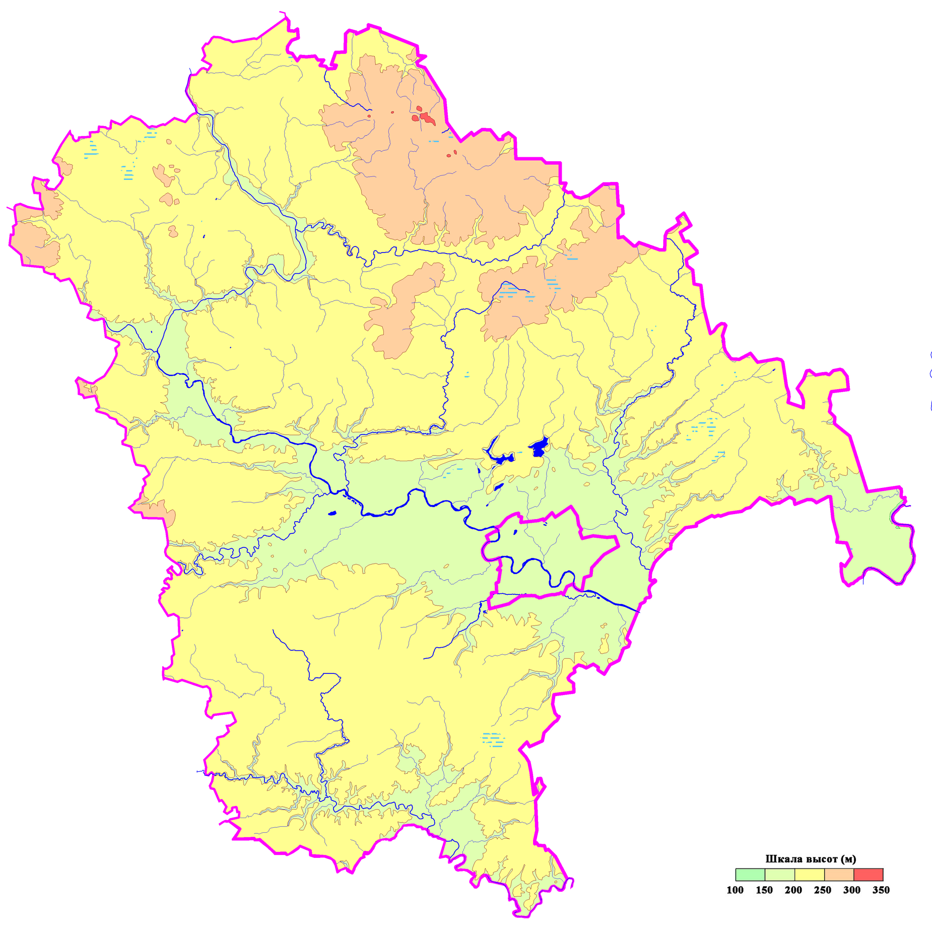 Физическая карта Ржевского района Тверской области